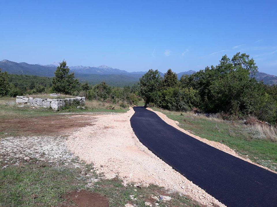 Требијови асфалт